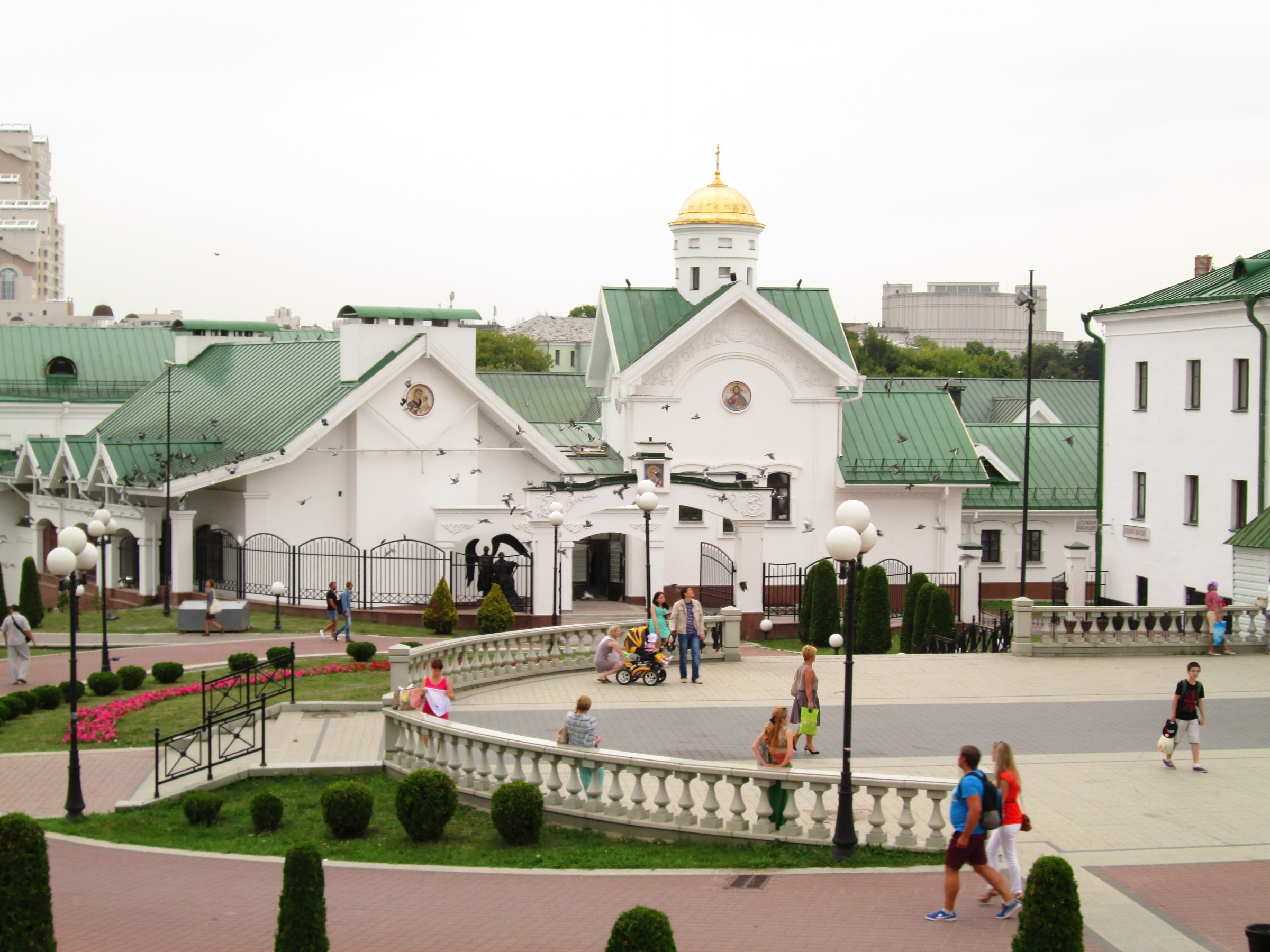 Minsk, Belarus